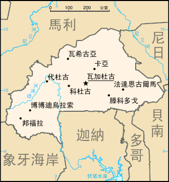 布吉納法索地圖。